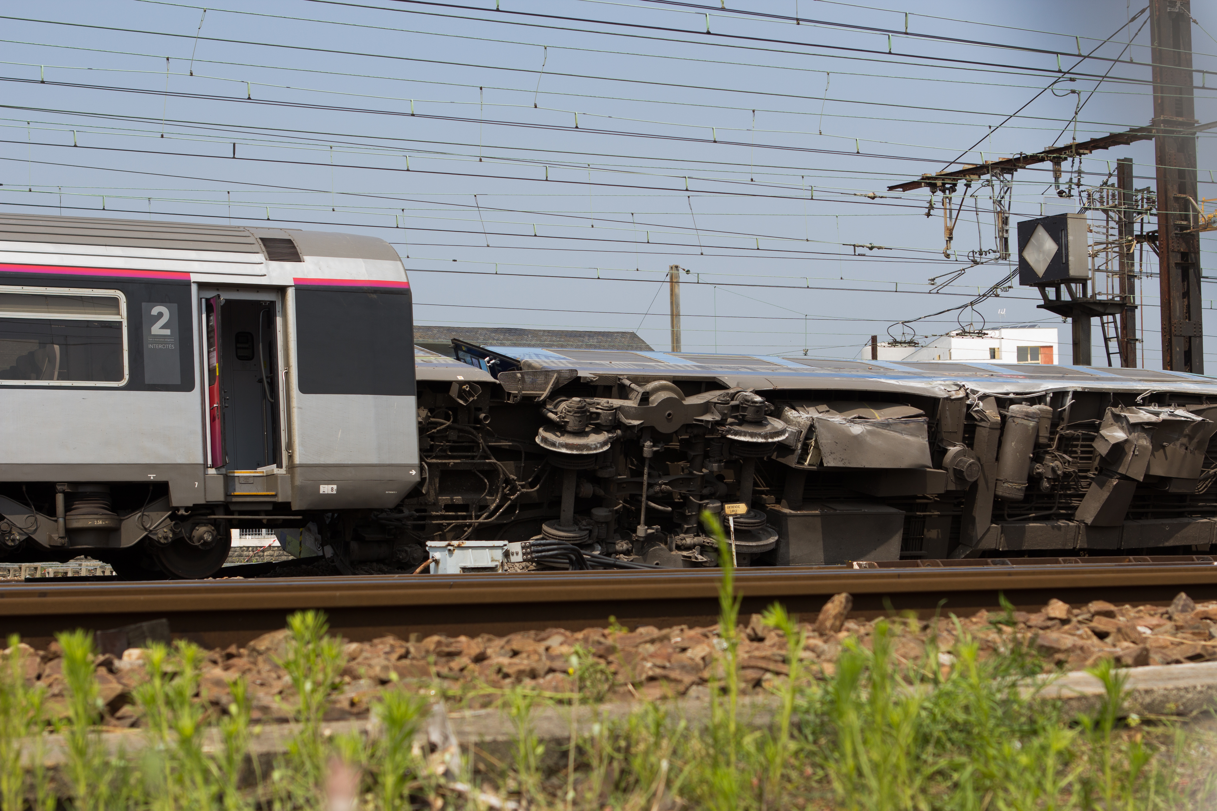 Accident ferroviaire de Brétigny-sur-Orge - Photos du train no 3657 (locomotive et voitures 1 à 4) en gare de Brétigny - Essonne - France